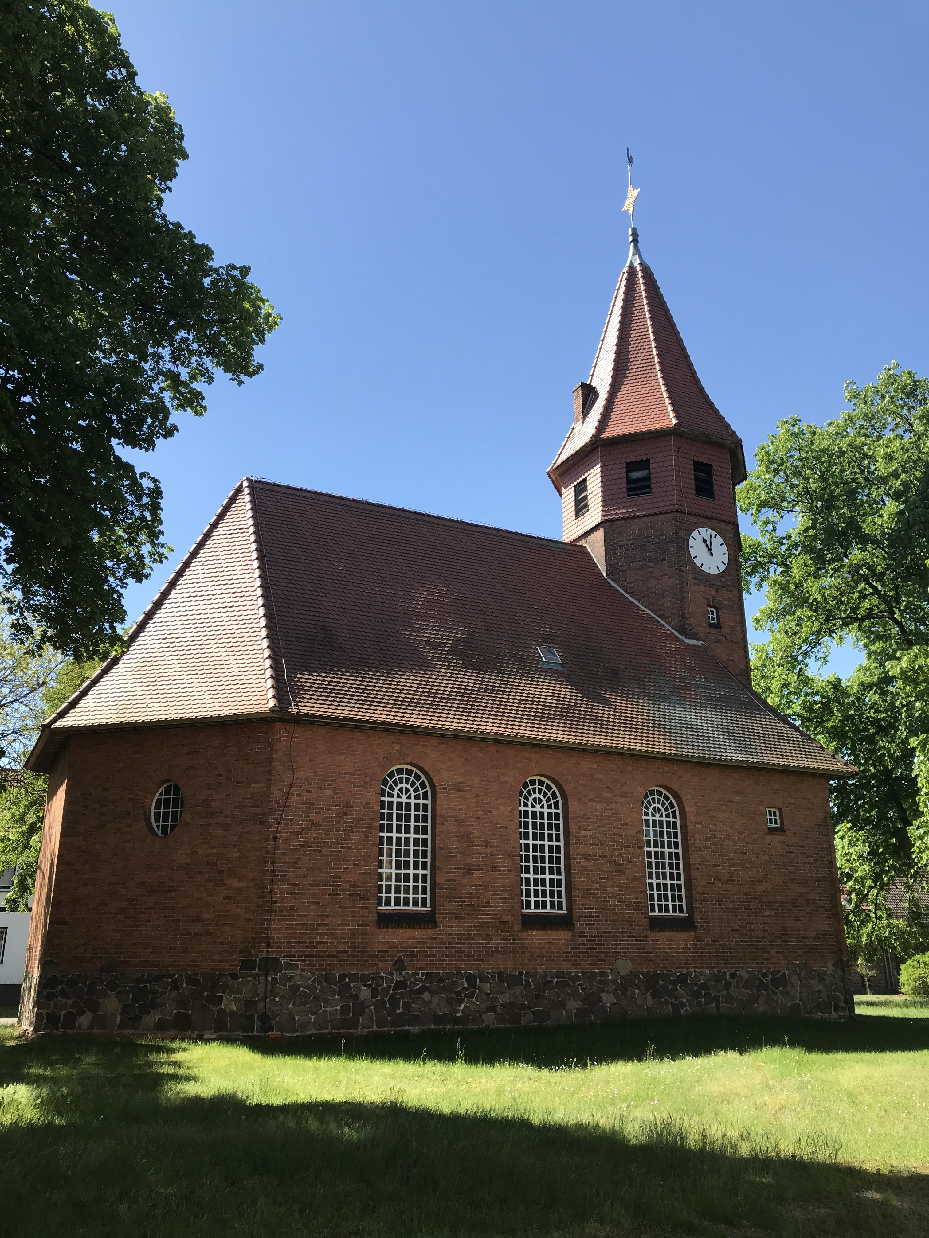 Die Dorfkirche in Schönefeld der Gemeinde Nuthe-Urstromtal entstand in den 1910er Jahren, vermutlich auf einem Vorgängerbau